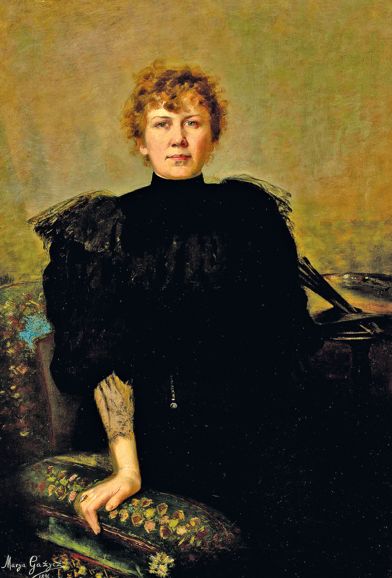 Autoportret z paletą